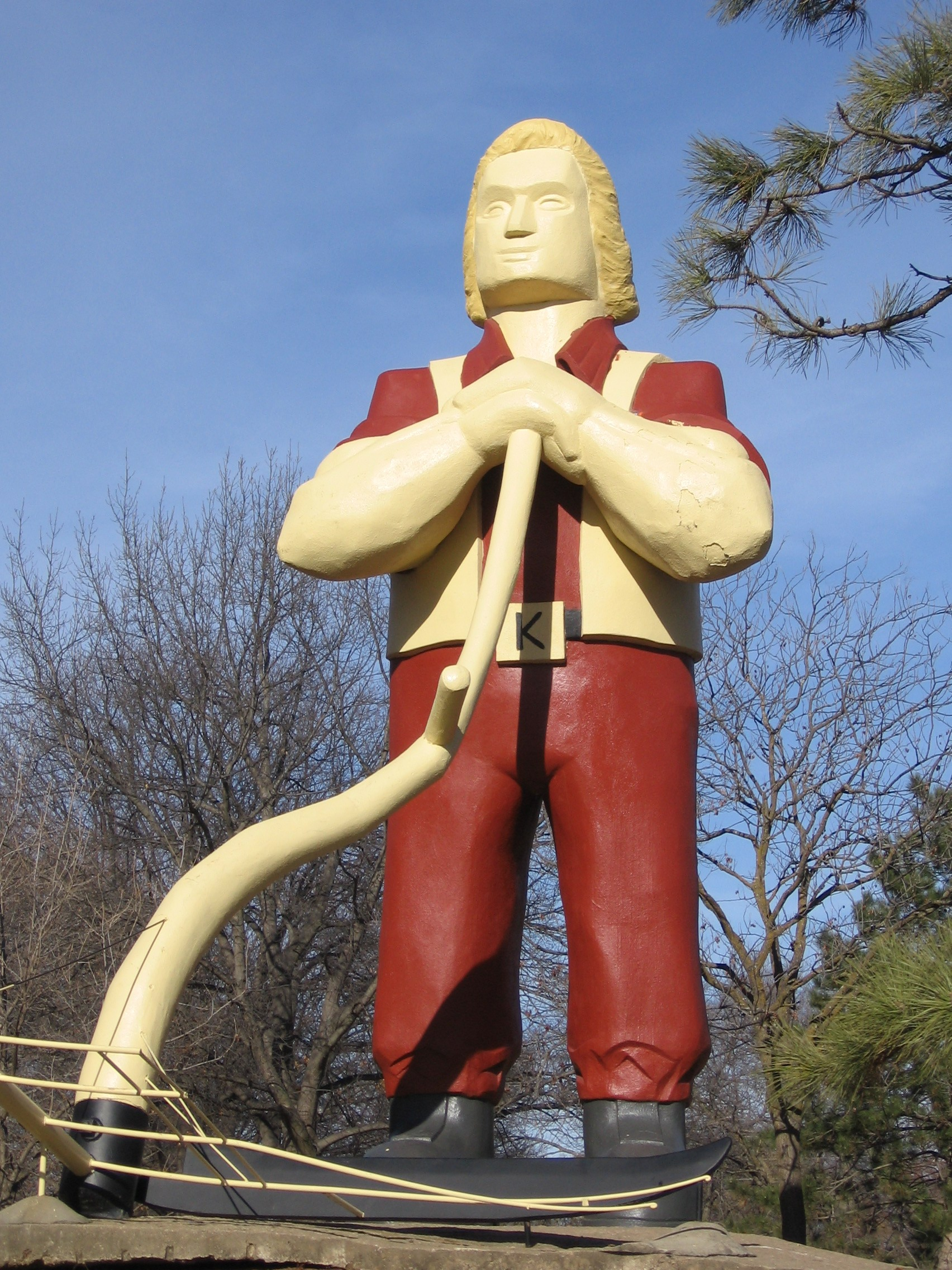 Image of Kansas